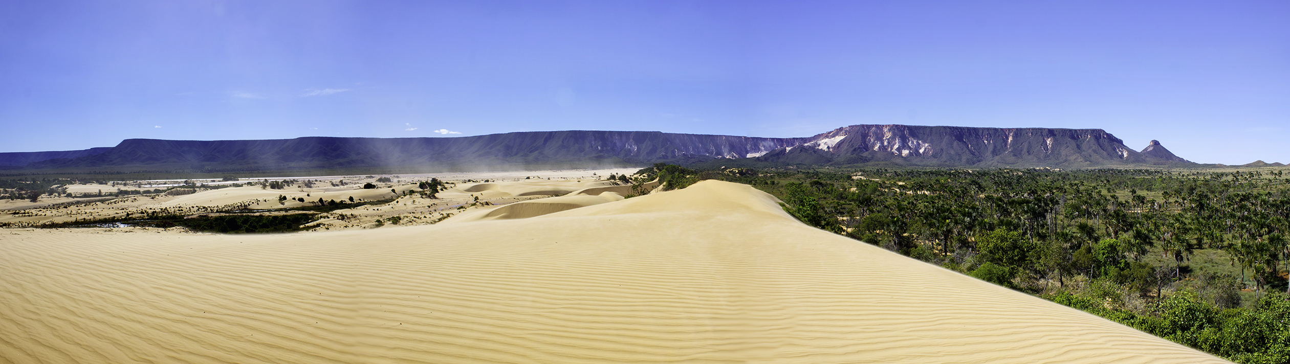 Panorâmica do parque estadual do Jalapão